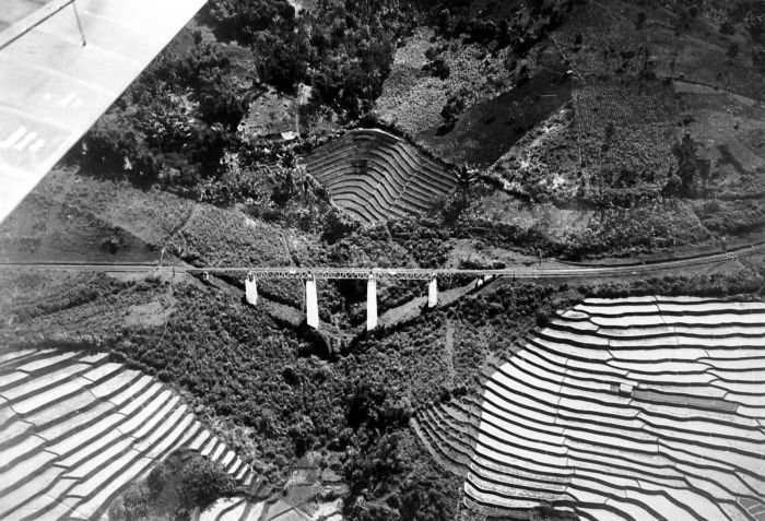 Repronegatief. Een luchtfoto van de spoorbrug in het sawahlandschap in de Preanger Regentschappen ter hoogte van halte Tjilamé, Bandoeng, West-Java